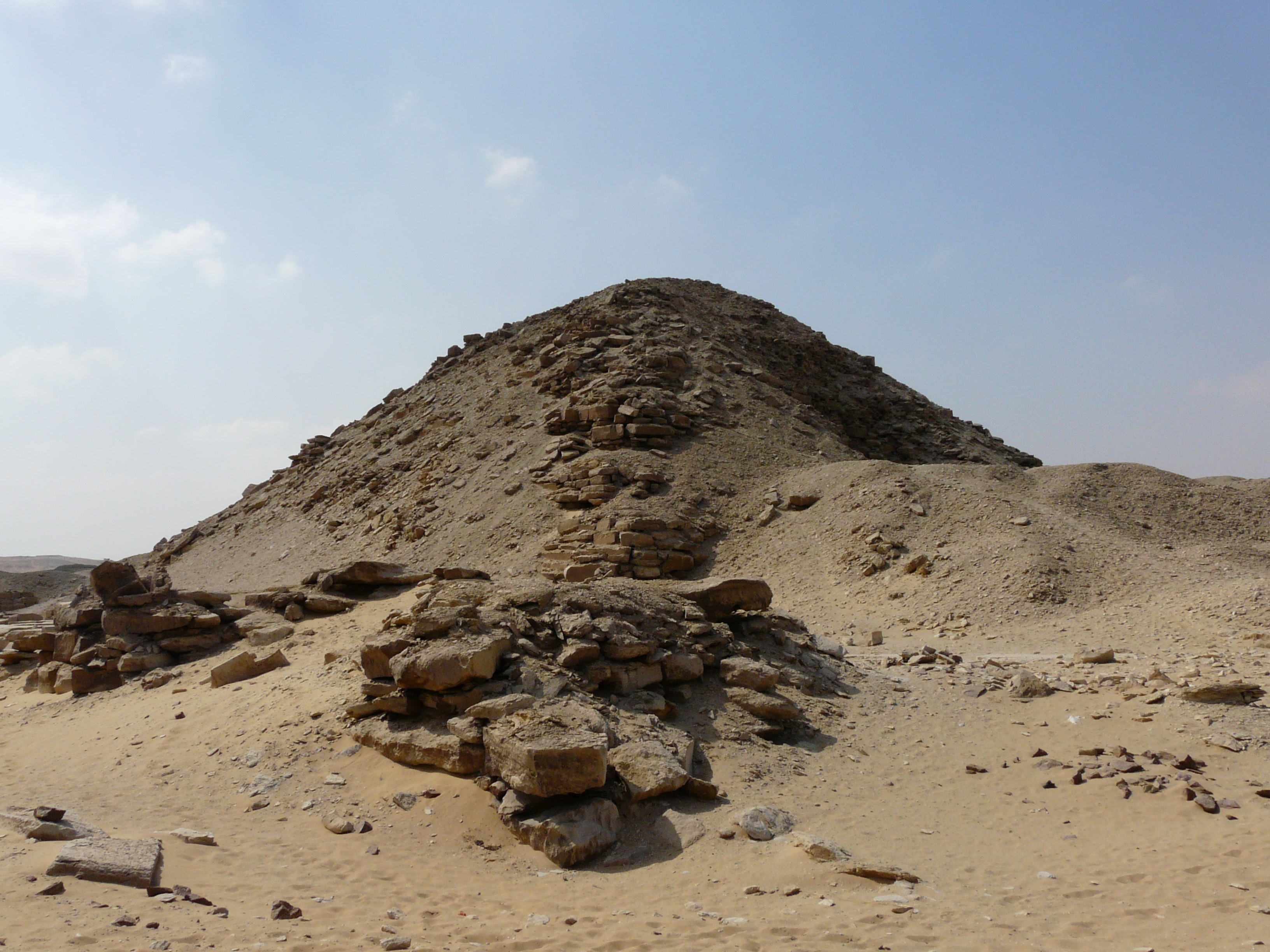 Pyramide de Niouserrê (Ve dynastie) - Abousir